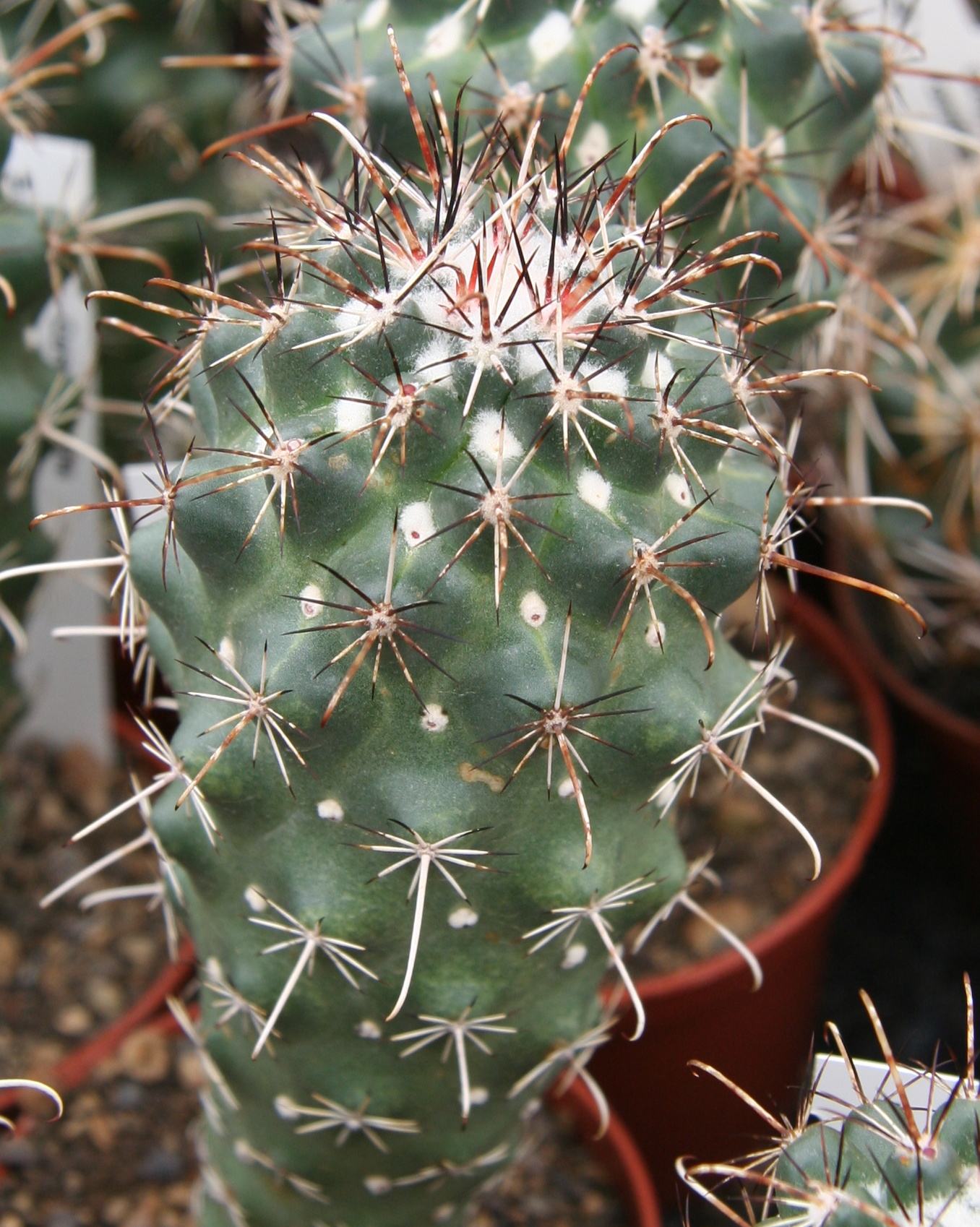 Coryphantha ancistracantha in der Kakteengärtnerei Haage, Erfurt